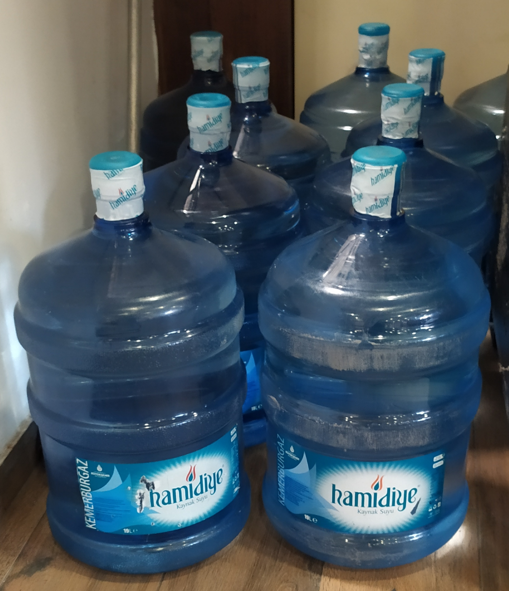 Hamidiye kaynak suyu 19 litre damacana